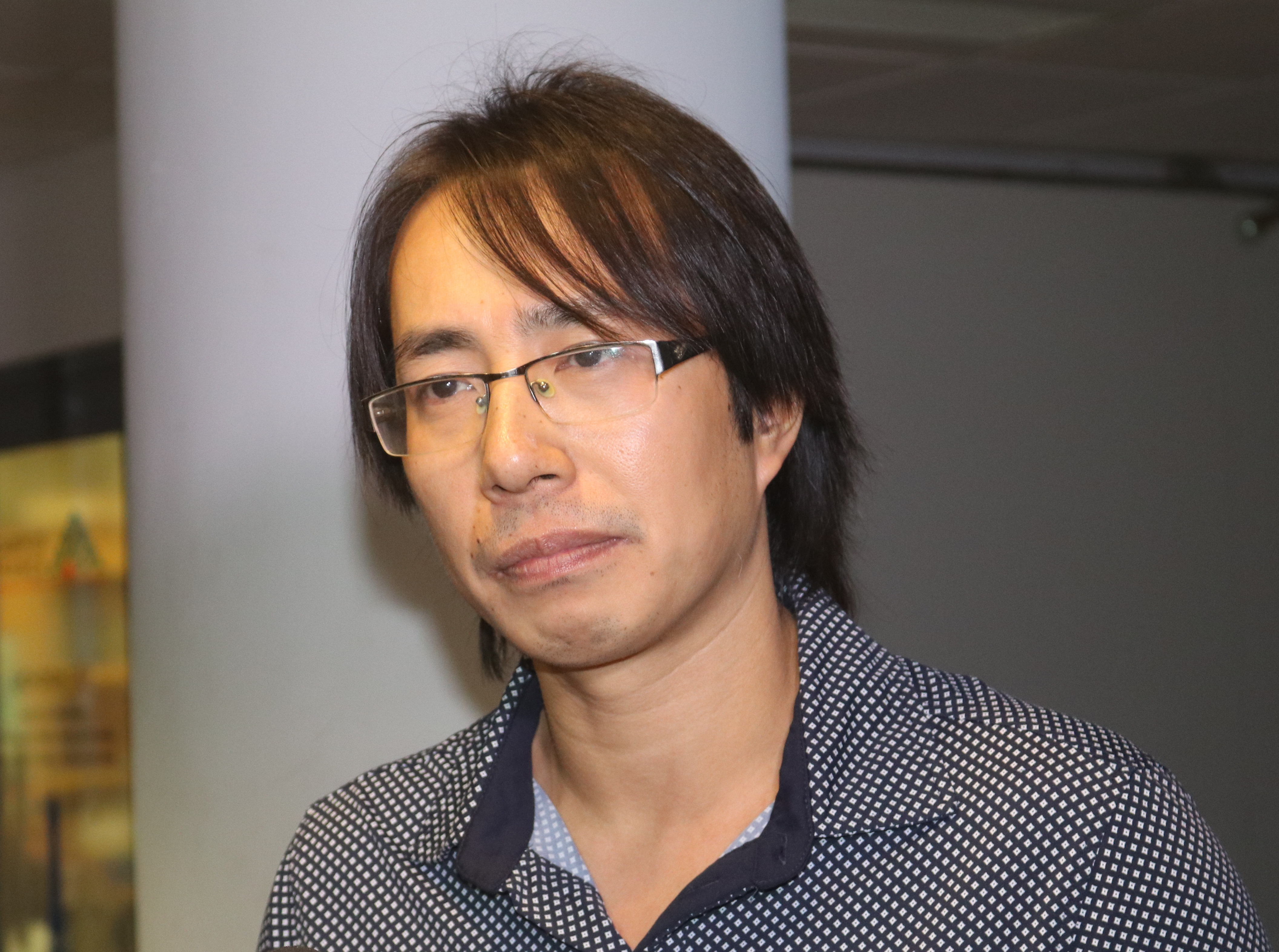 Trương Anh Ngọc tại l'Espace Hà Nội